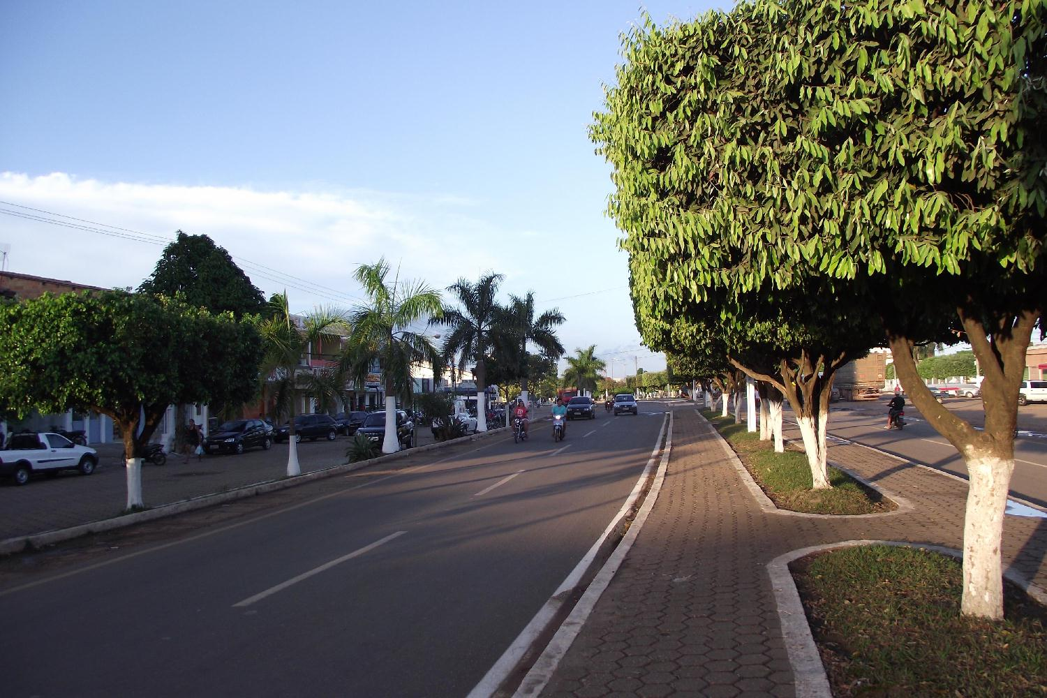 Avenida central de Rondon do Pará